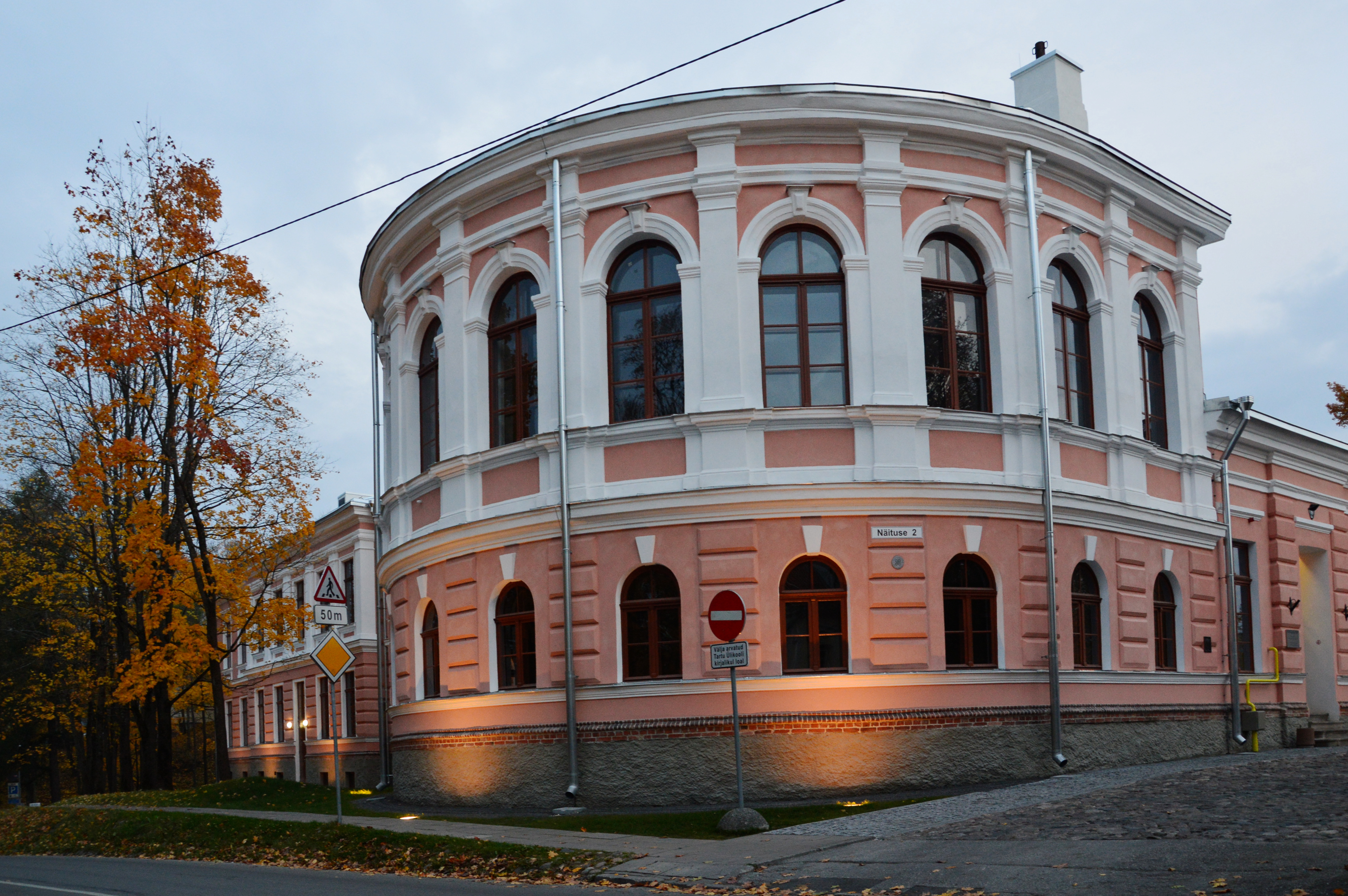 Uus Anatoomikum